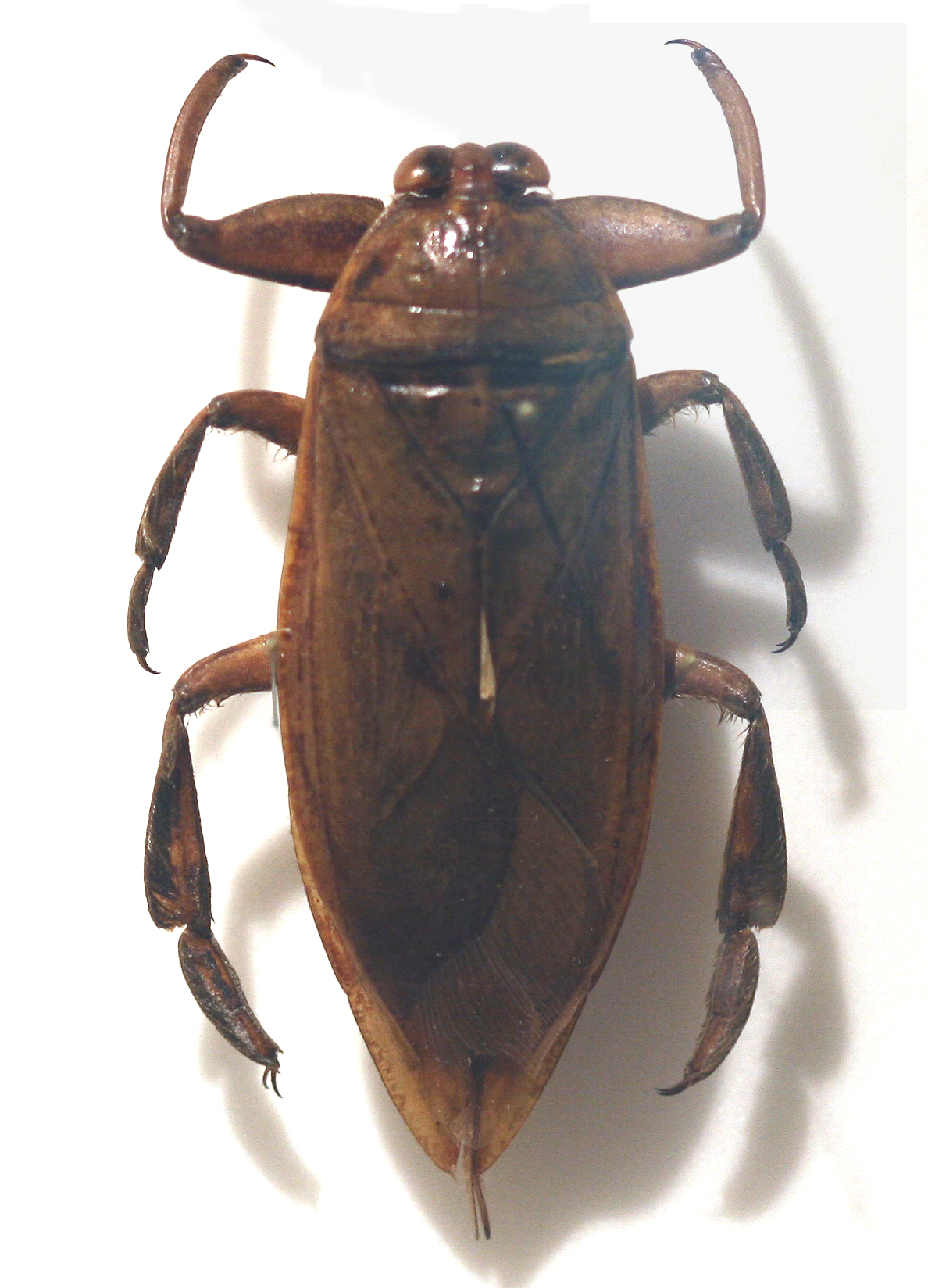 Hemiptera: Heteroptera: Belostomatidae: Belostoma gigantea